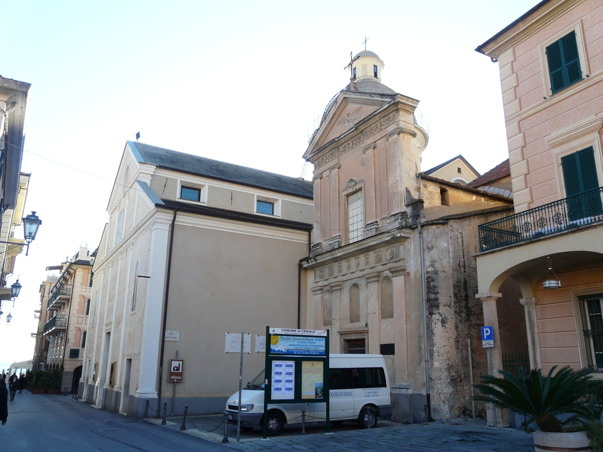 Chiesa dei Santi Giovanni Battista ed Eugenio, Ceriale, Liguria, Italia